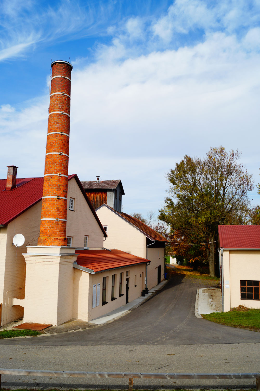 Eglsee (Straubing), ehemalige Brennerei, Hausnummer 2